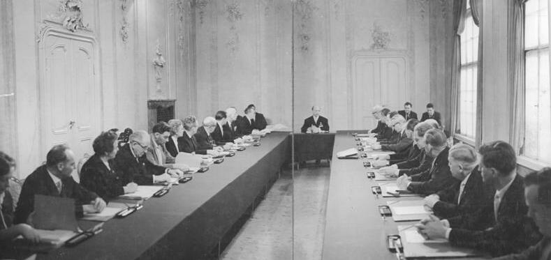 Zentralbild Junge 13.11.1963 Konstituierende Sitzung des Staatsrates der DDR. Der von den Abgeordneten der Volkskammer zu ihrer 1. Sitzung gewählte Staatsrat der DDR trat am 13.11.1963 in seinem Amtssitz Berlin-Niederschönhausen zur konstituierenden Tagung zusammen. UBz: Während der konstituierenden Sitzung des Staatsrates. (Mitte) der Vorsitzende des Staatsrates Walter Ulbricht. (Linke Seite von links nach rechts) die Mitglieder des Staatsrates Christel Pappe, Horst Schumann, Else Merke, Bernard Koenen, Paul Strauss, Prof. Dr. Ing. habil Lieselott Herford., Dr. Günter Mittag, Friedrich Ebert; die Stellvertreter des Vorsitzenden des Staatsrates Hans Rietz und Heinrich Homann; der Sekretär des Staatsrates Otto Gotsche. (Rechte Seite von rechts nach links): Die Mitglieder des Staatsrates Christian Steinmüller, Friedrich Kind, Karl Rieke, Erich Grützner, Prof. Hans Rodenberg, Klaus Sorgenicht, Prof. Dr.Dr. h.c. Erich Correns, Willi Stoph; die Stellvertreter des Vorsitzenden des Staatsrates Manfred Gerlach, Gerald Götting und Prof. Dr. h.c. Johannes Dieckmann.